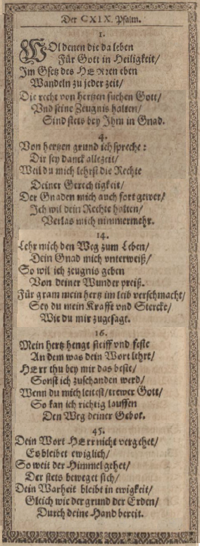 Cornelius Becker, Psalm 119, Strophen 1, 4, 14, 16 und 45, Grundlage der heutigen ökumenischen Fassung des Liedes Wohl denen, die da wandeln